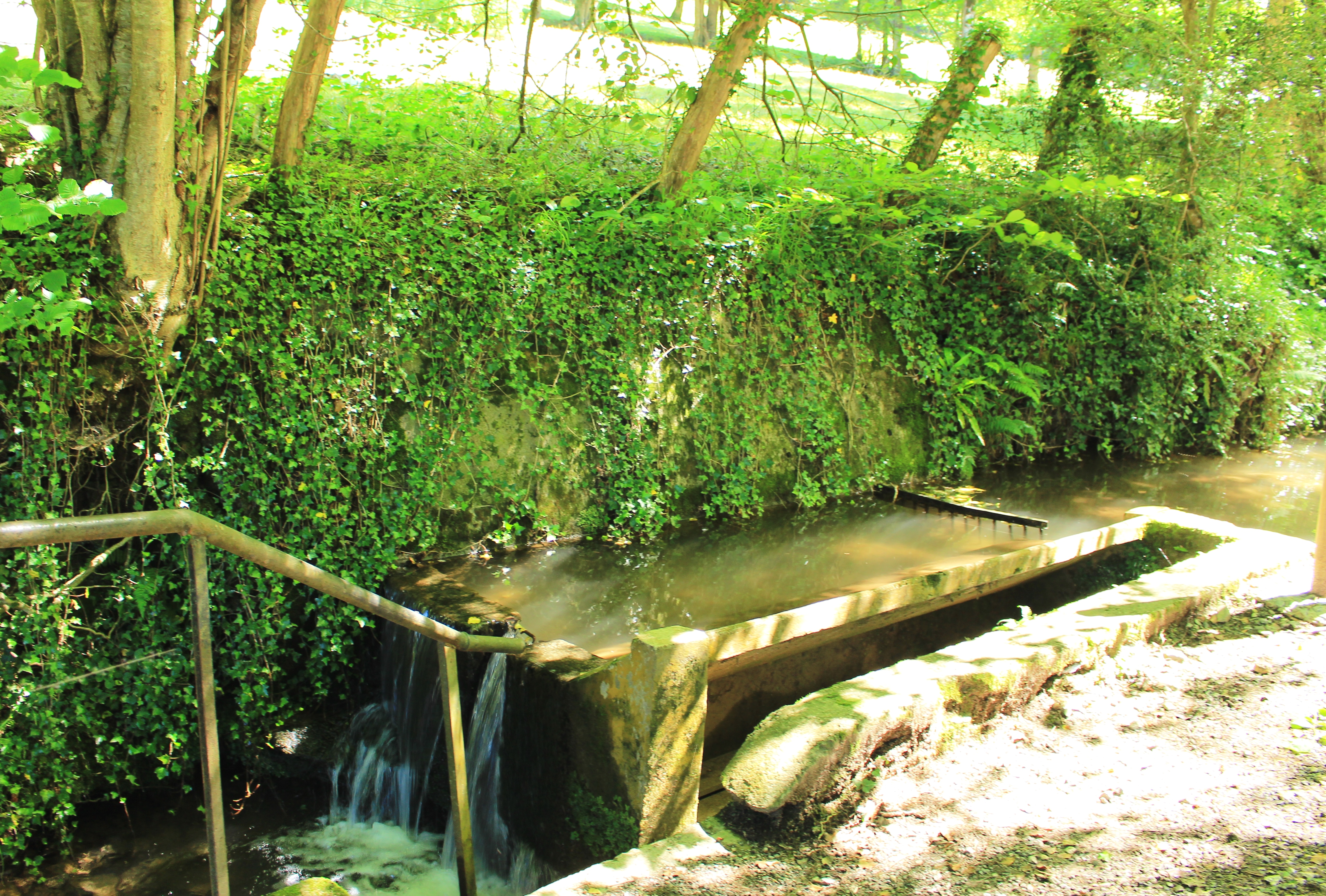 Lavoir de Gerde (Hautes-Pyrénées)